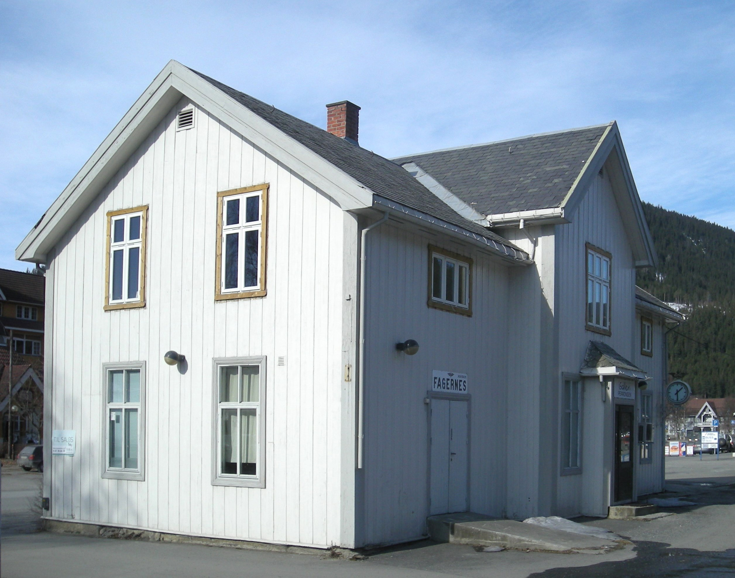 Fagernes stasjon i 2010